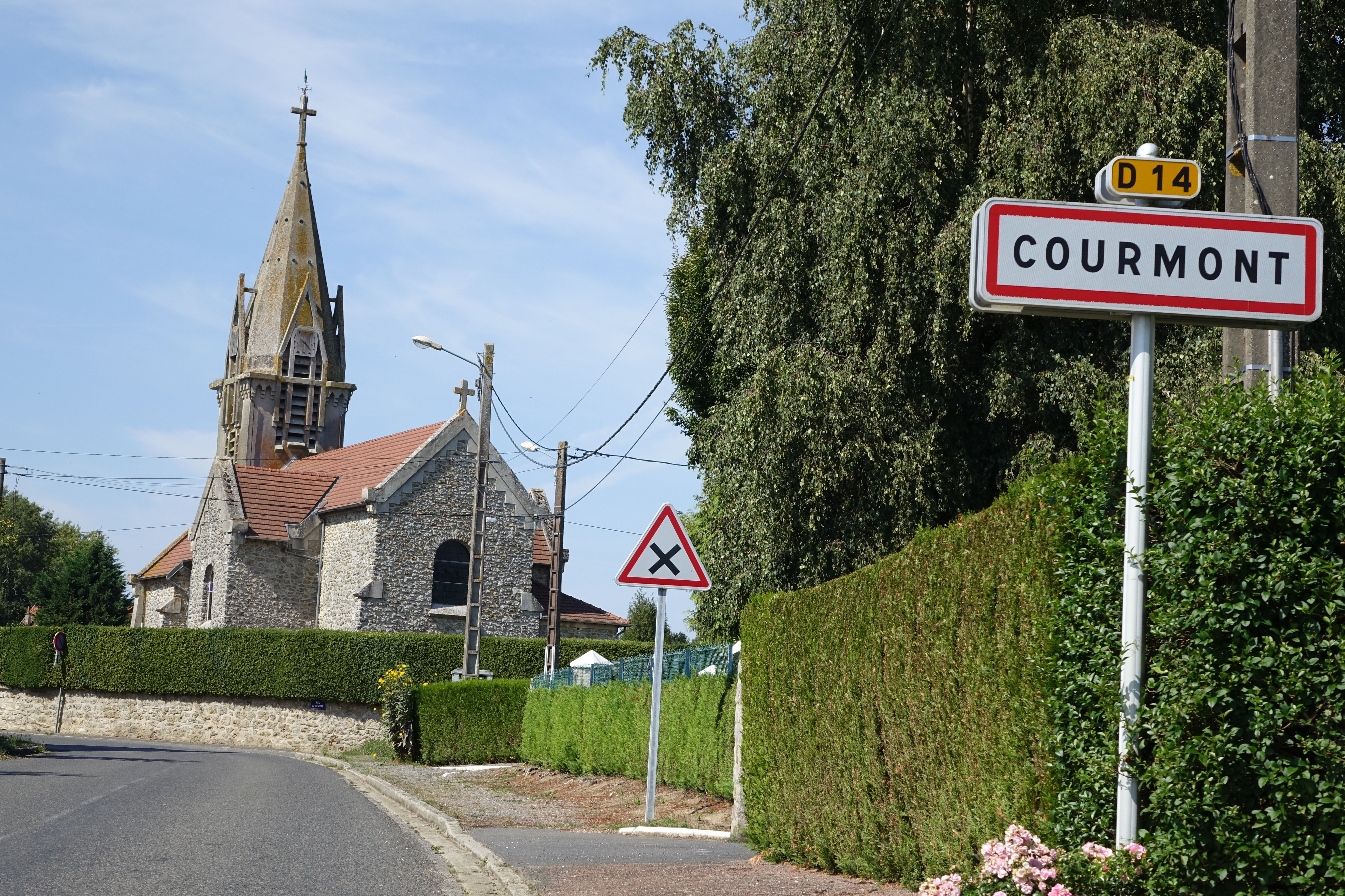 Entrée de Courmont avec son église au second plan, Aisne, France